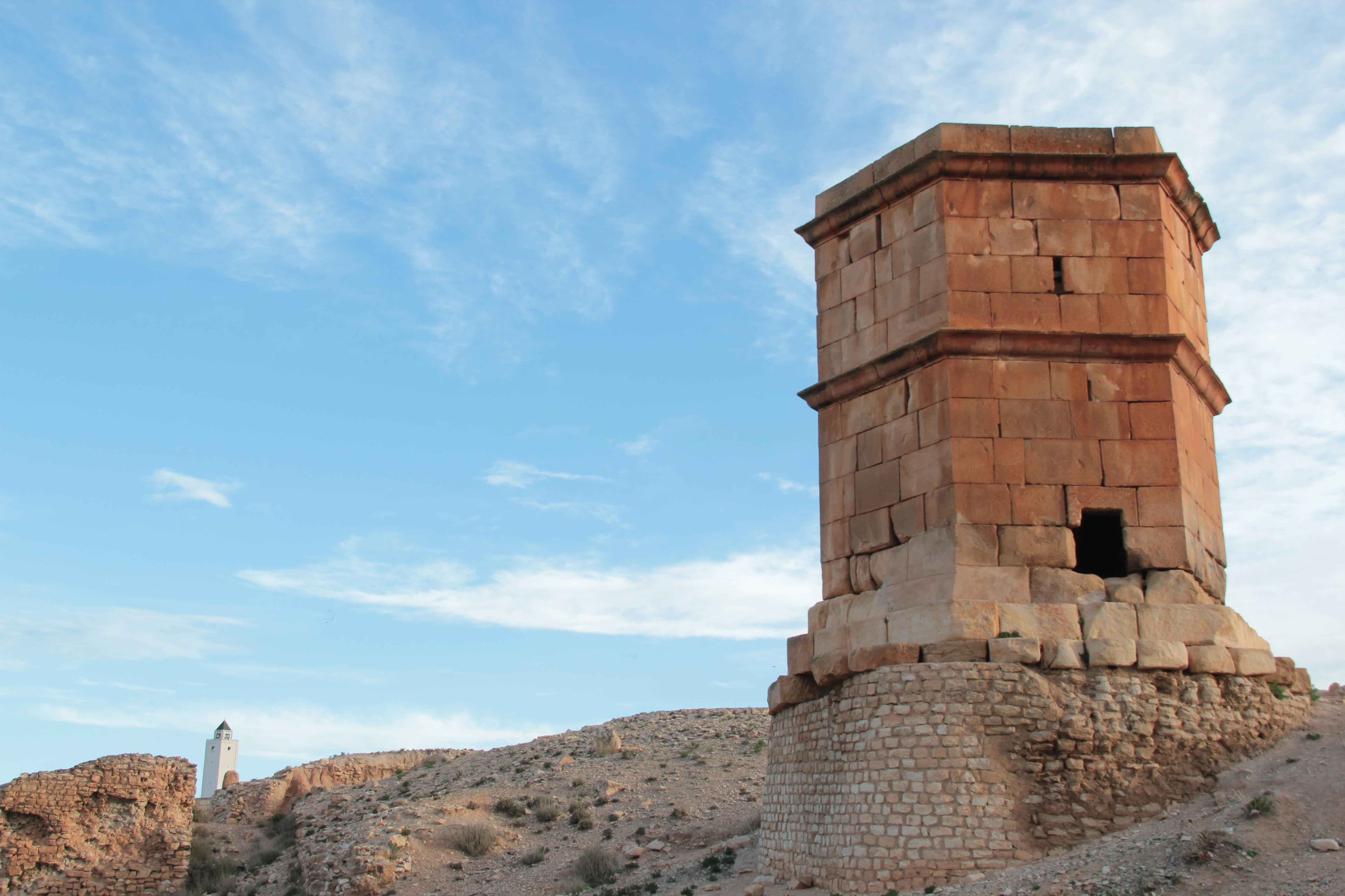 Région de Haïdra - Mausolée Hexagonal